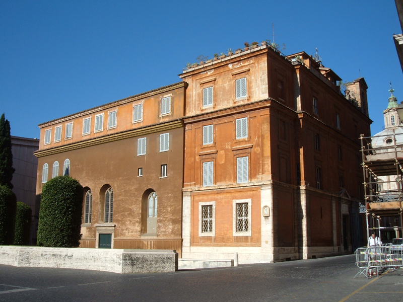 Edificio in cui è inserita la chiesa di Santa Maria della Pietà in Campo Santo dei Teutonici, nella città del Vaticano.